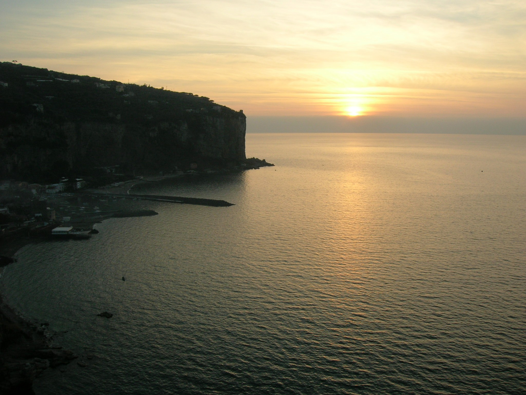 Tramonto a Vico Equense